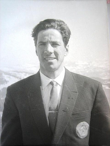 Грач Р.Д